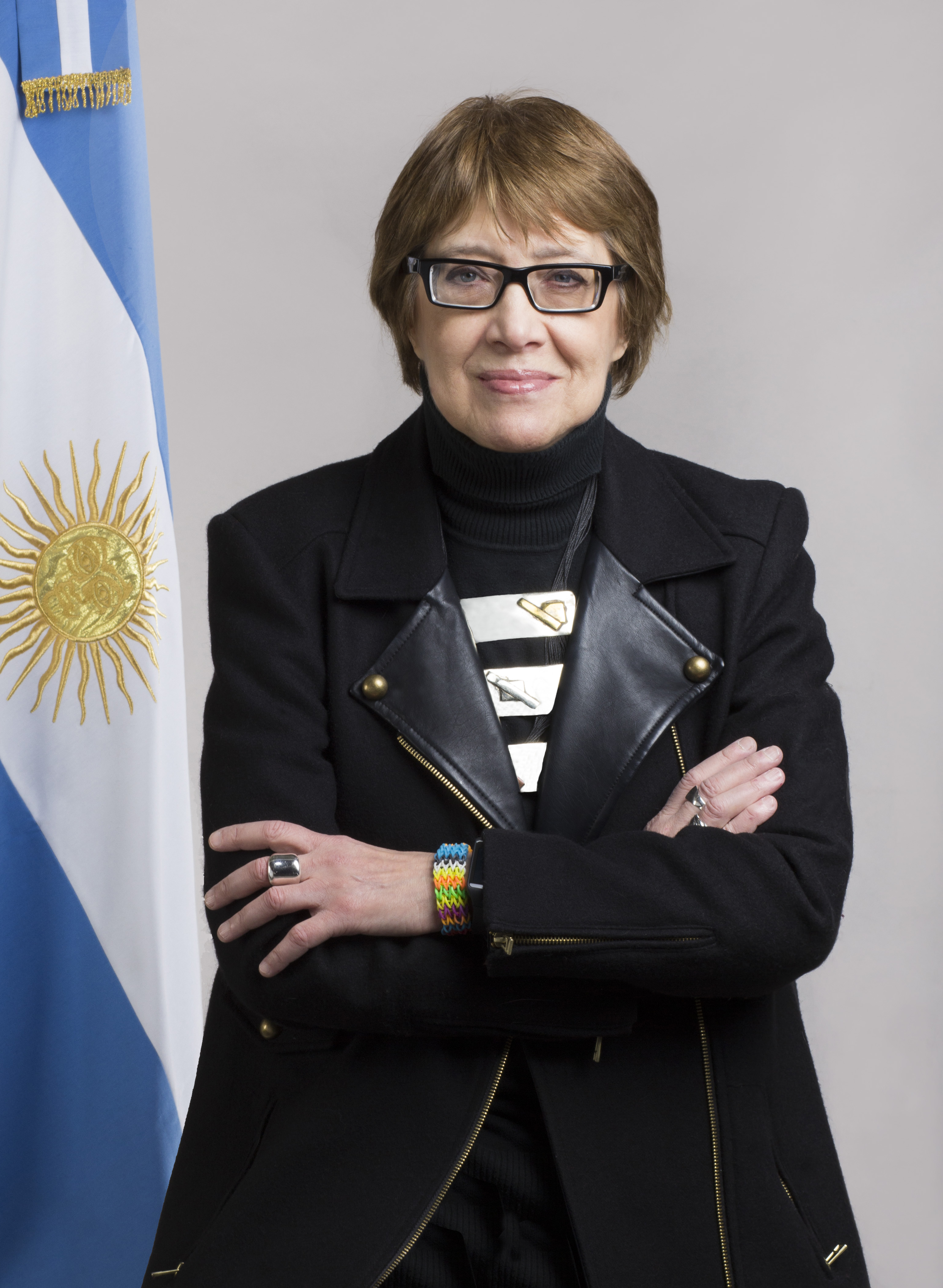 Retratos de las autoridades del Ministerio de Cultura de la Nación. En la foto: Ministra de cultura de la Nación, Teresa Parodi